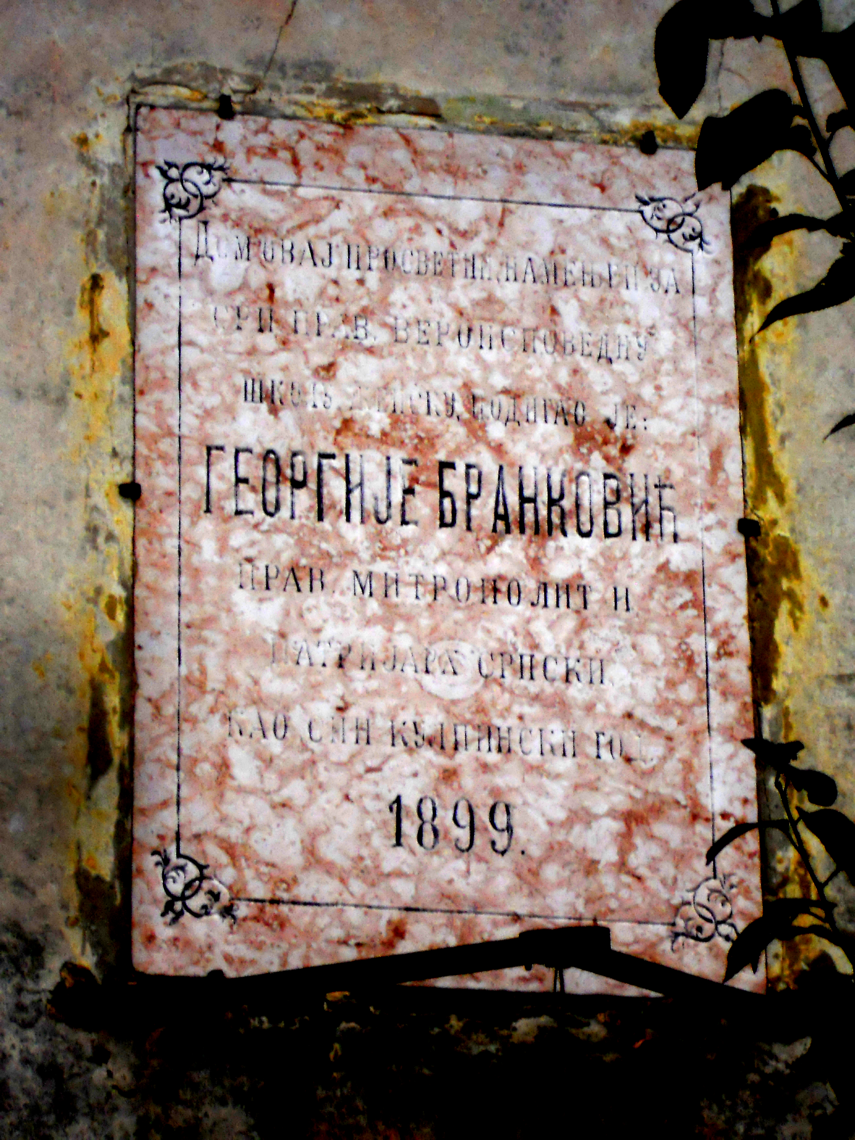 Srpski (latinica): Ploča Georgija Brankovića na zadužbini školi u Kulpinu izgrađenu 1899